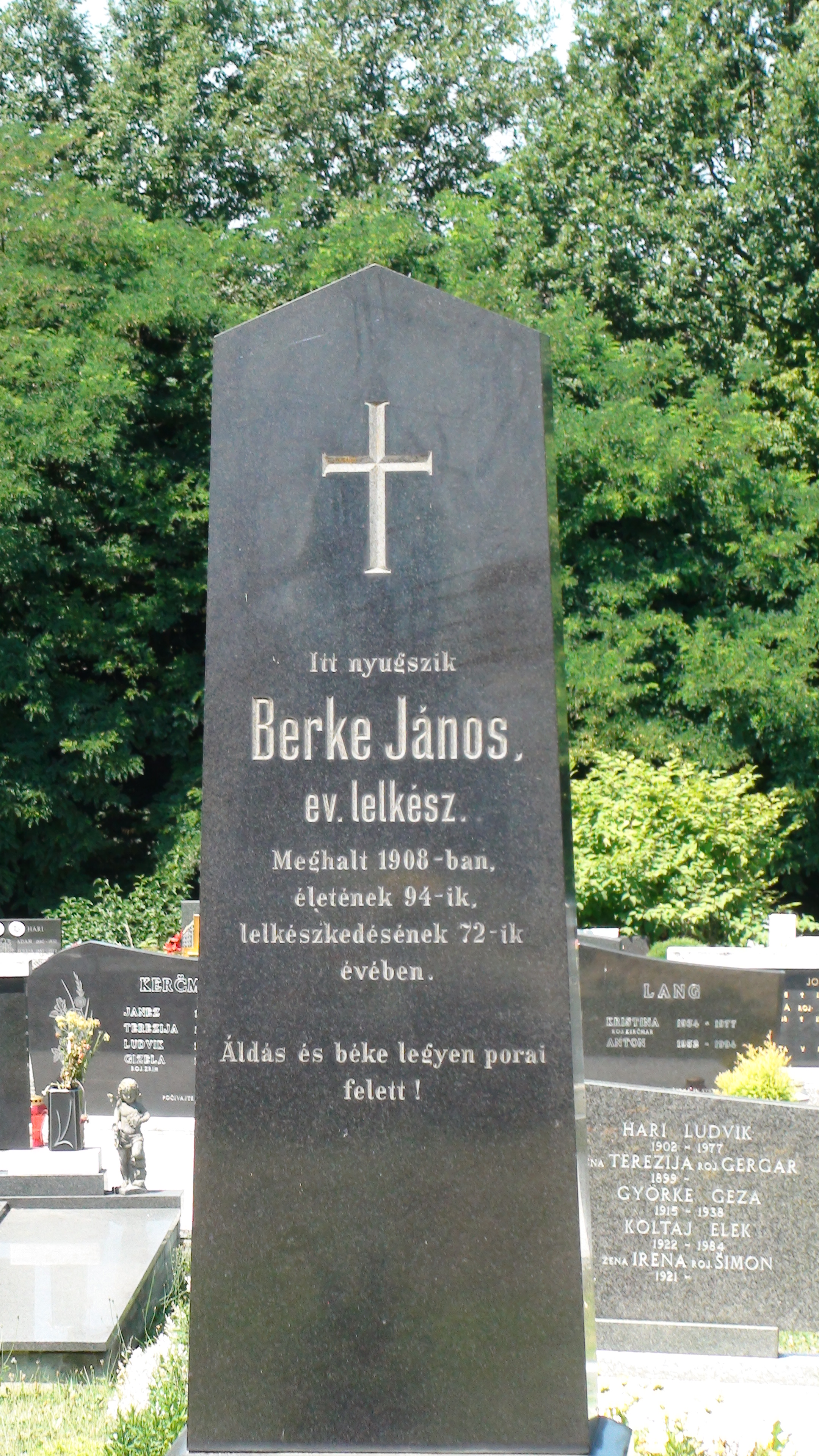 Grob Berke Janosa